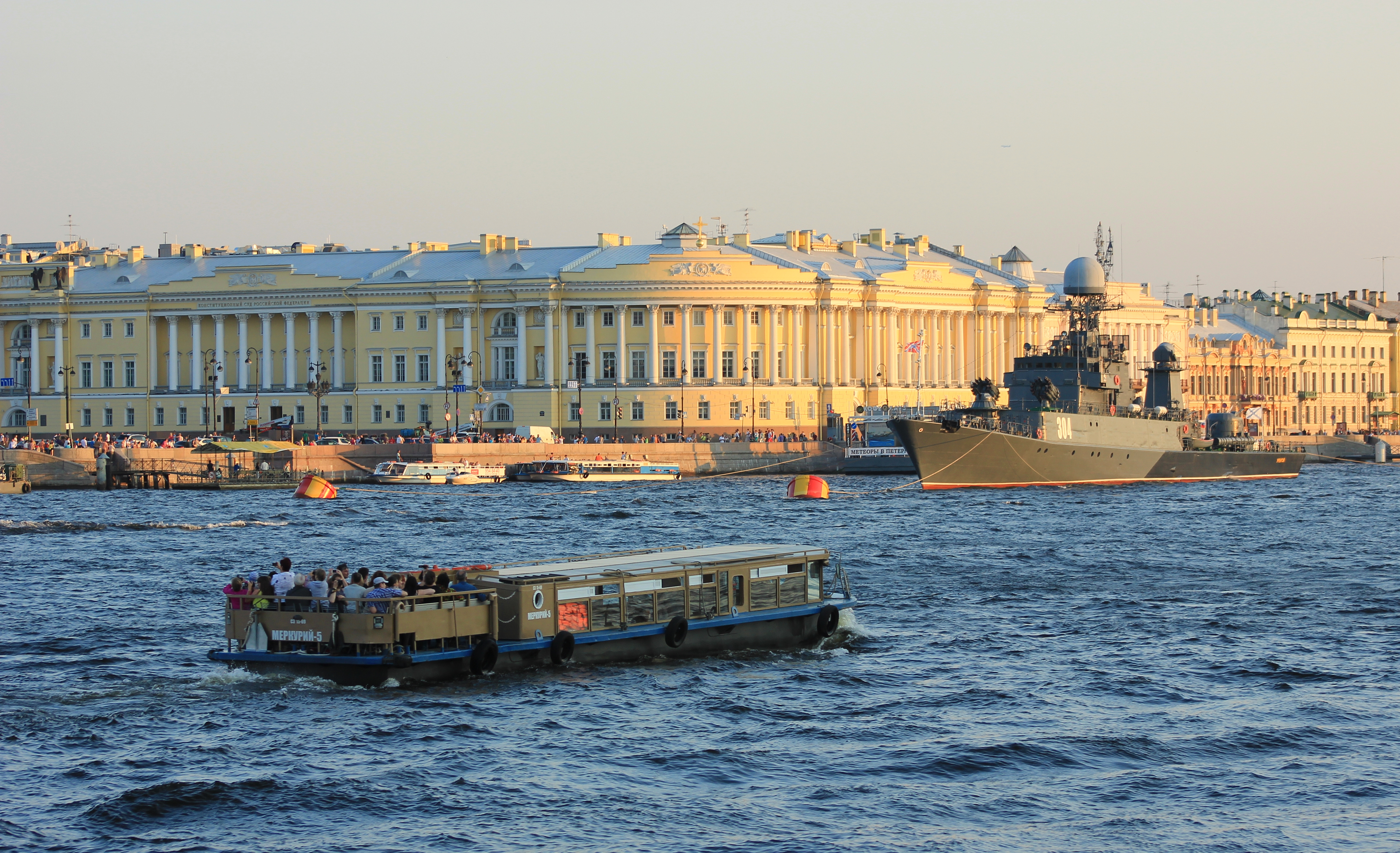 Сенат и Синод с набережной Васильевского острова.Сенатская площадь. Санкт-Петербург. Россия.